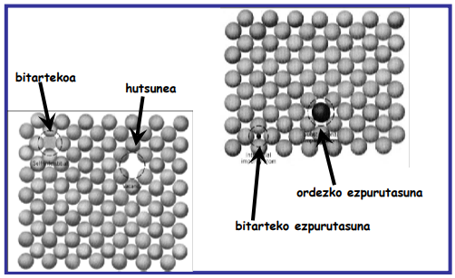 Puntu-akatsak